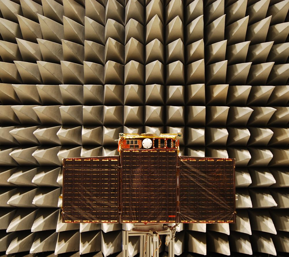 Der Kleinsatellit TET-1 beim Umwelttest (EMC Test Kammer)